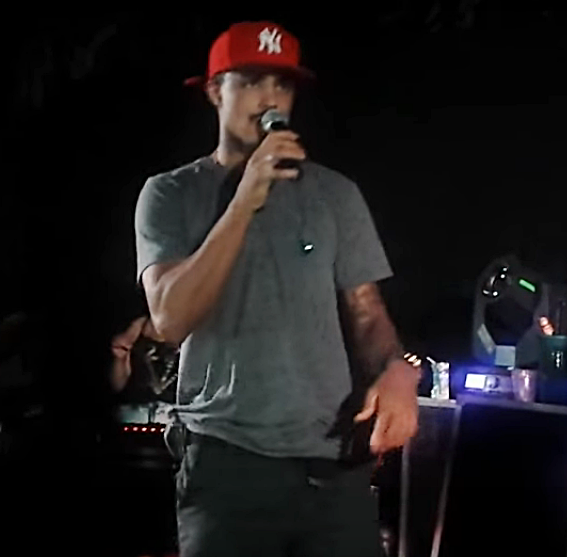 O cantor MC Livinho em março de 2016.